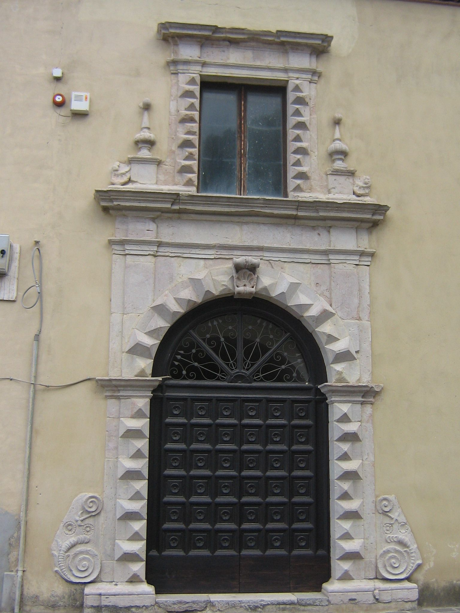 Portone del monastero